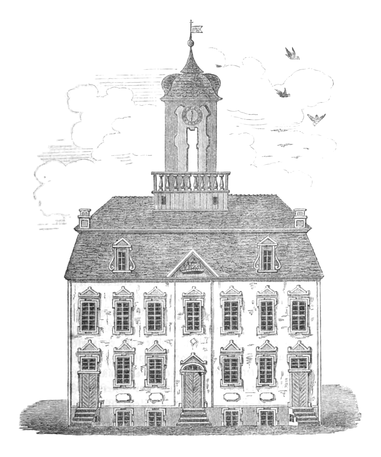 Schippenbeil in Ostpreußen, Zeichnung des historischen Rathauses, das 1752-1753 erbaut und 1807 in der Nacht vor der Schlacht bei Friedland von den Russen niedergebrannt und später nicht wieder aufgebaut wurde.